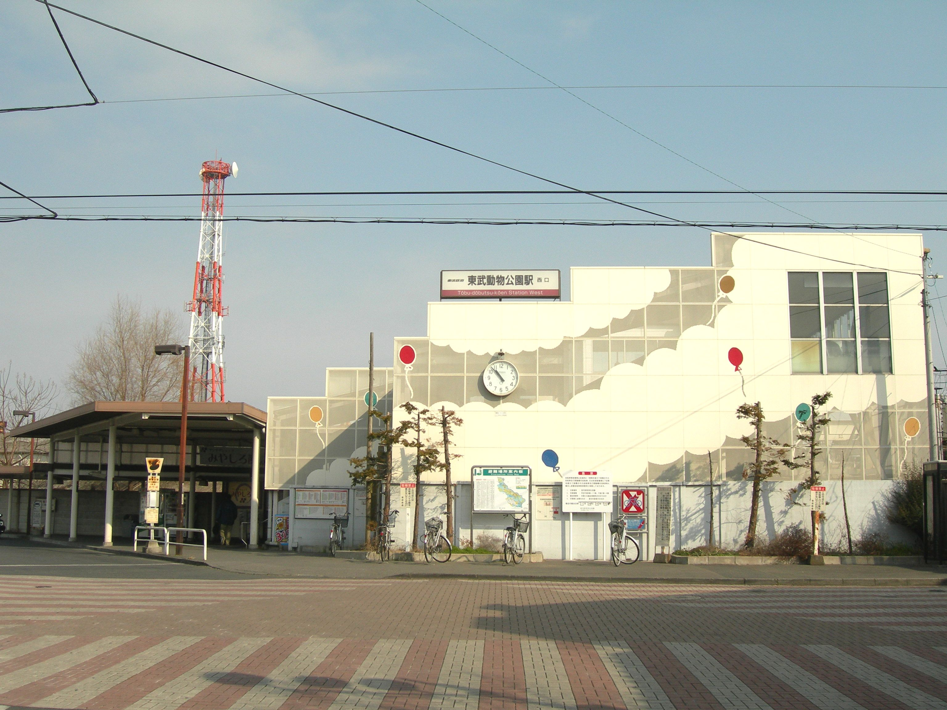 東武動物公園駅西口